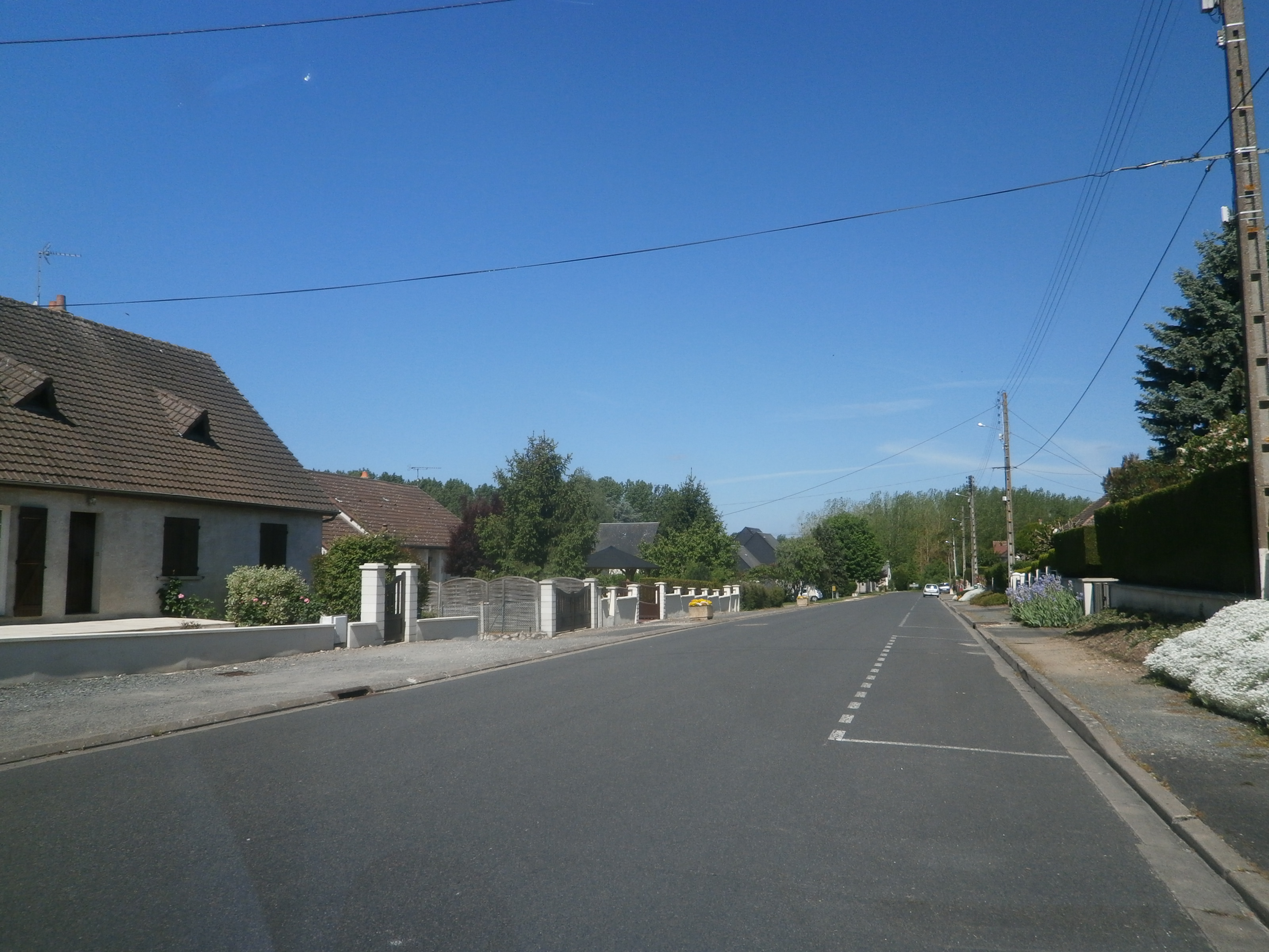 Lotissement récent à Monrésor